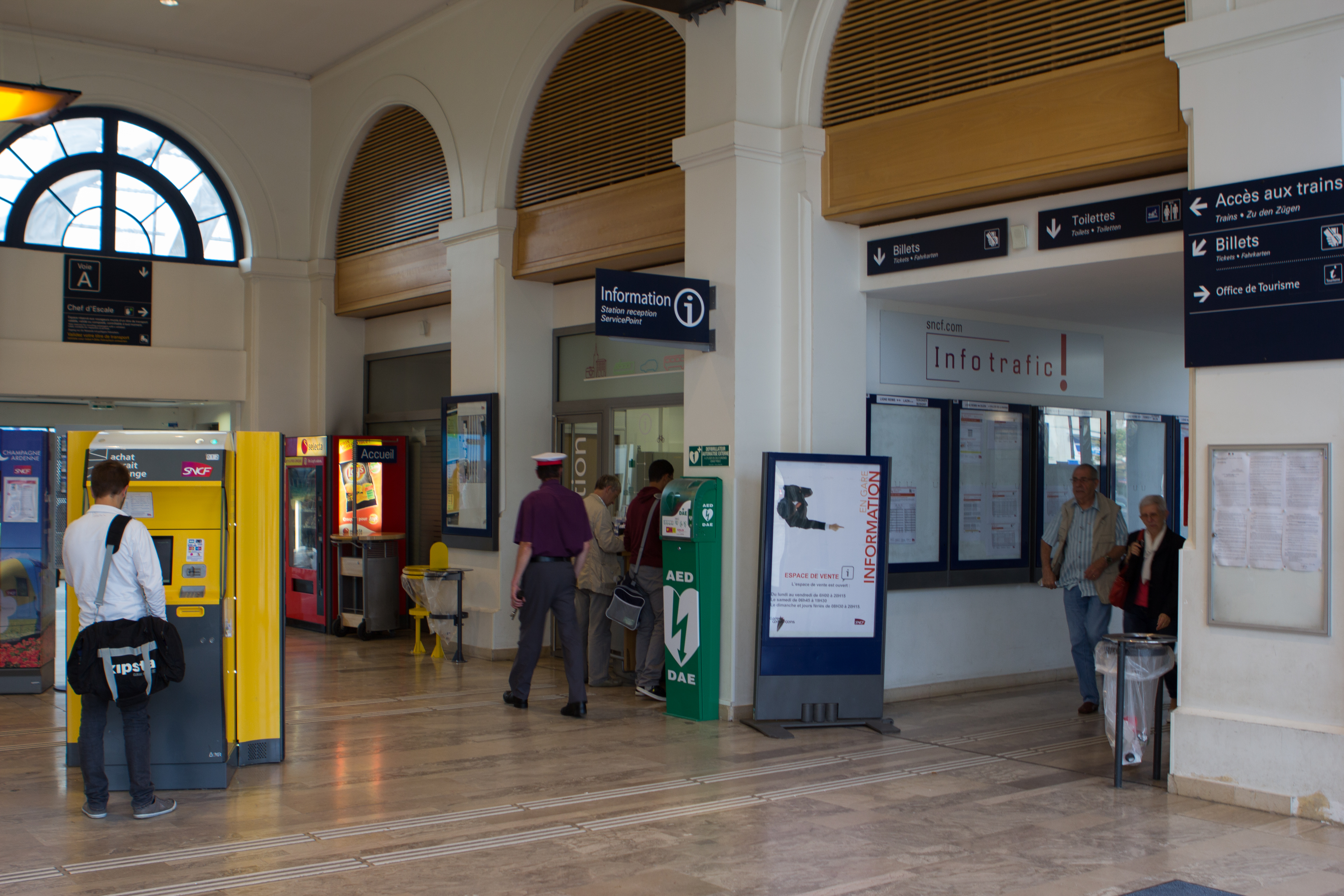 Intérieur du bâtiment voyageur de la gare de Reims / Reims, Marne, France